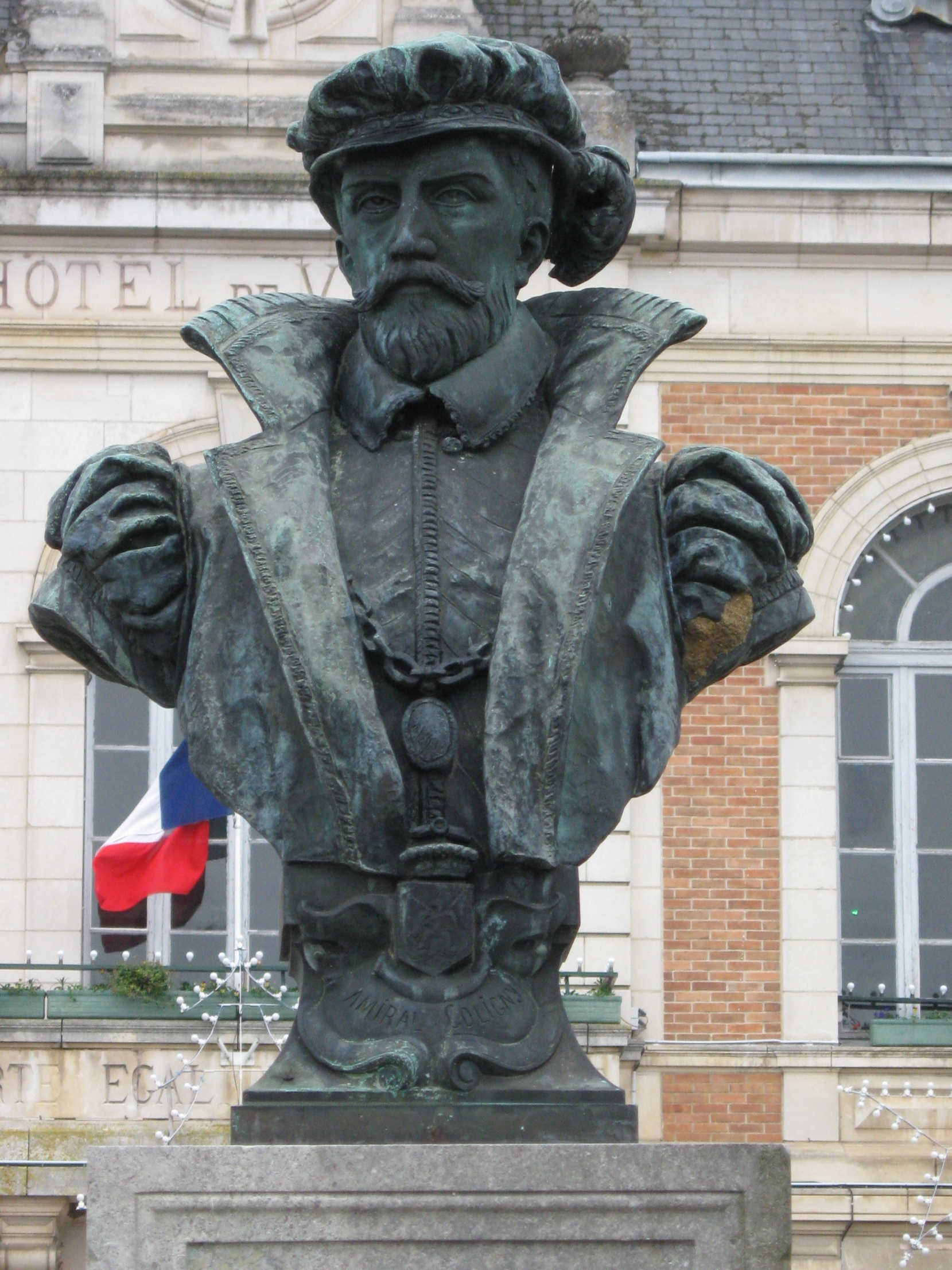 Buste de Gaspard de Coligny devant la mairie de Châtillon-Coligny.